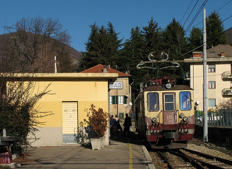 Elettromotrice A9 presso la stazione di Casella Paese della Ferrovia Genova Casella